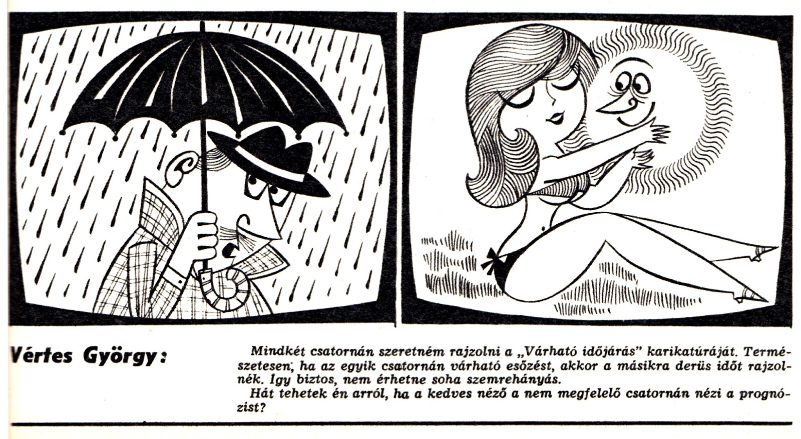 Vértes György karikatúrája a várható időjárásról: A Magyar Televízió újonnan induló második csatornáján mit várhatnak a nézők? - körkérdés a televízió néhány munkatársához